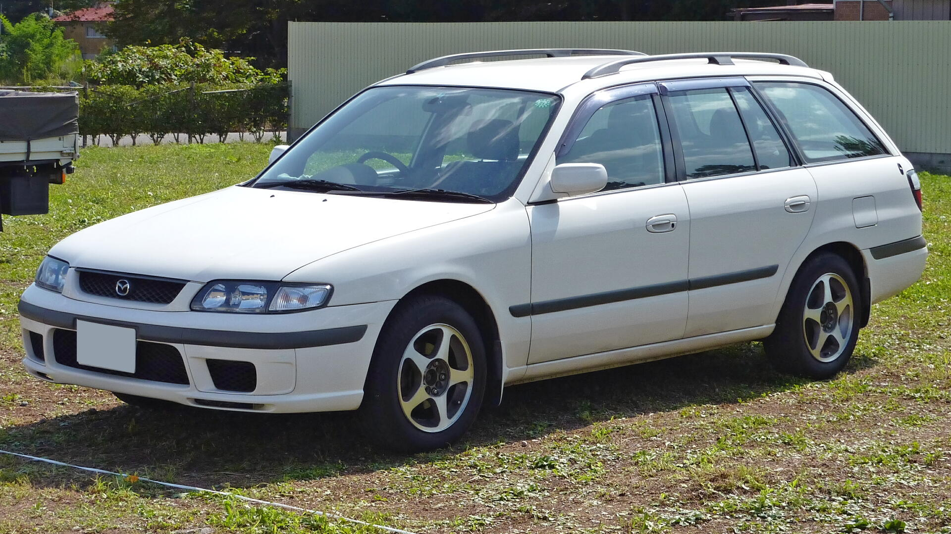 マツダ・カペラワゴン（GF型）